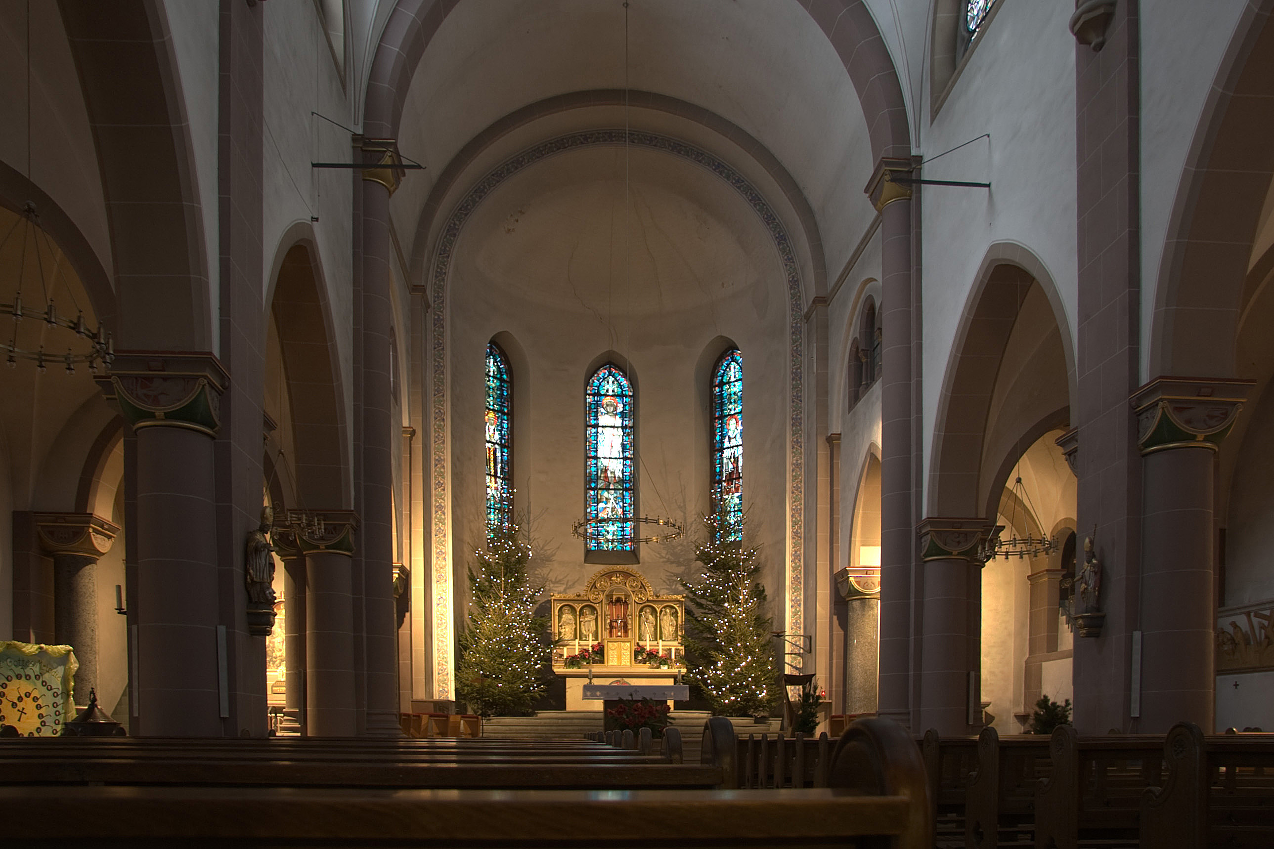 Innenraum der Pfarrkirche St. Alexander in Schmallenberg